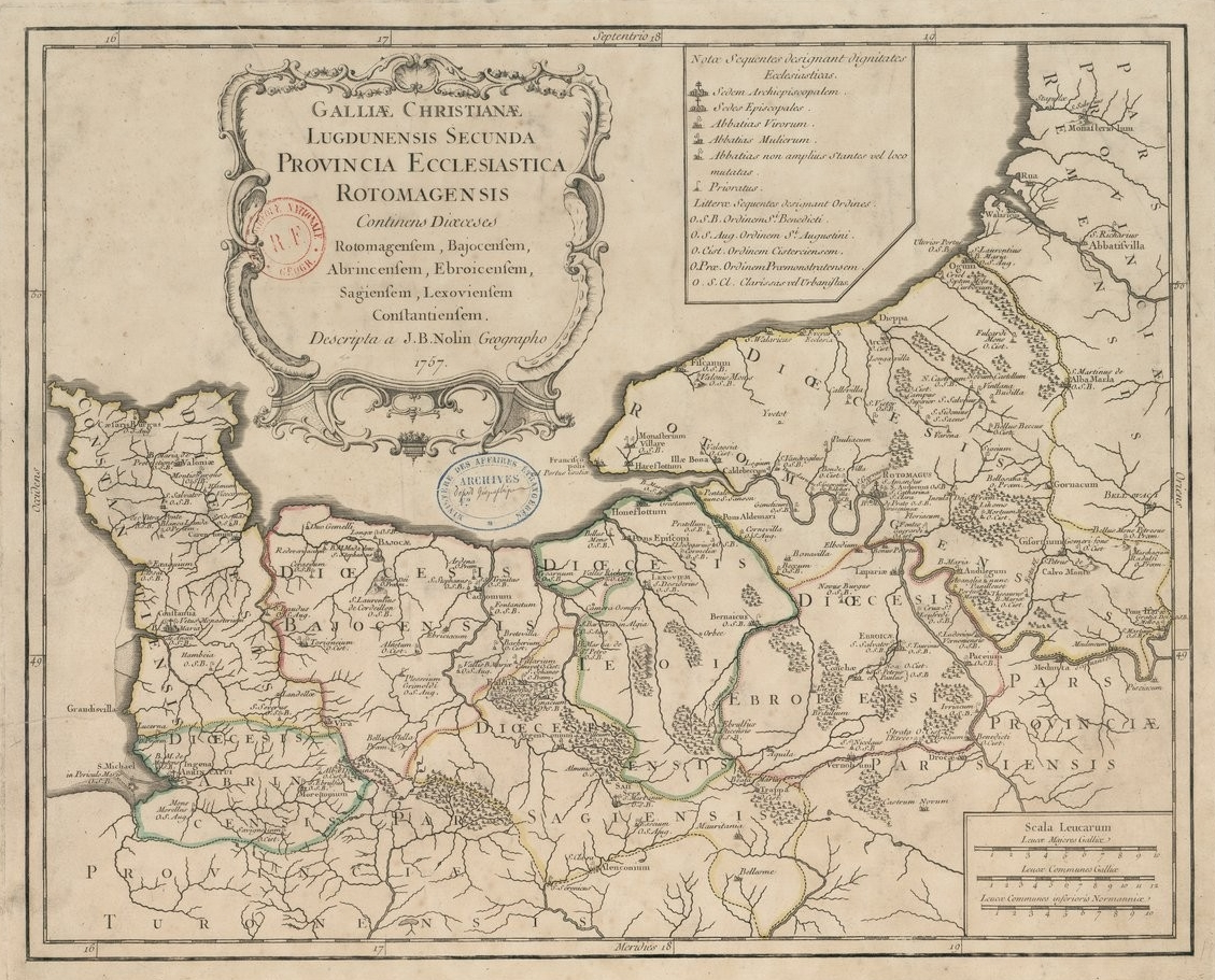 Carte de l'ancienne province ecclésiastique de Rouen, insérée dans la Gallia Christiana (1715/1759).